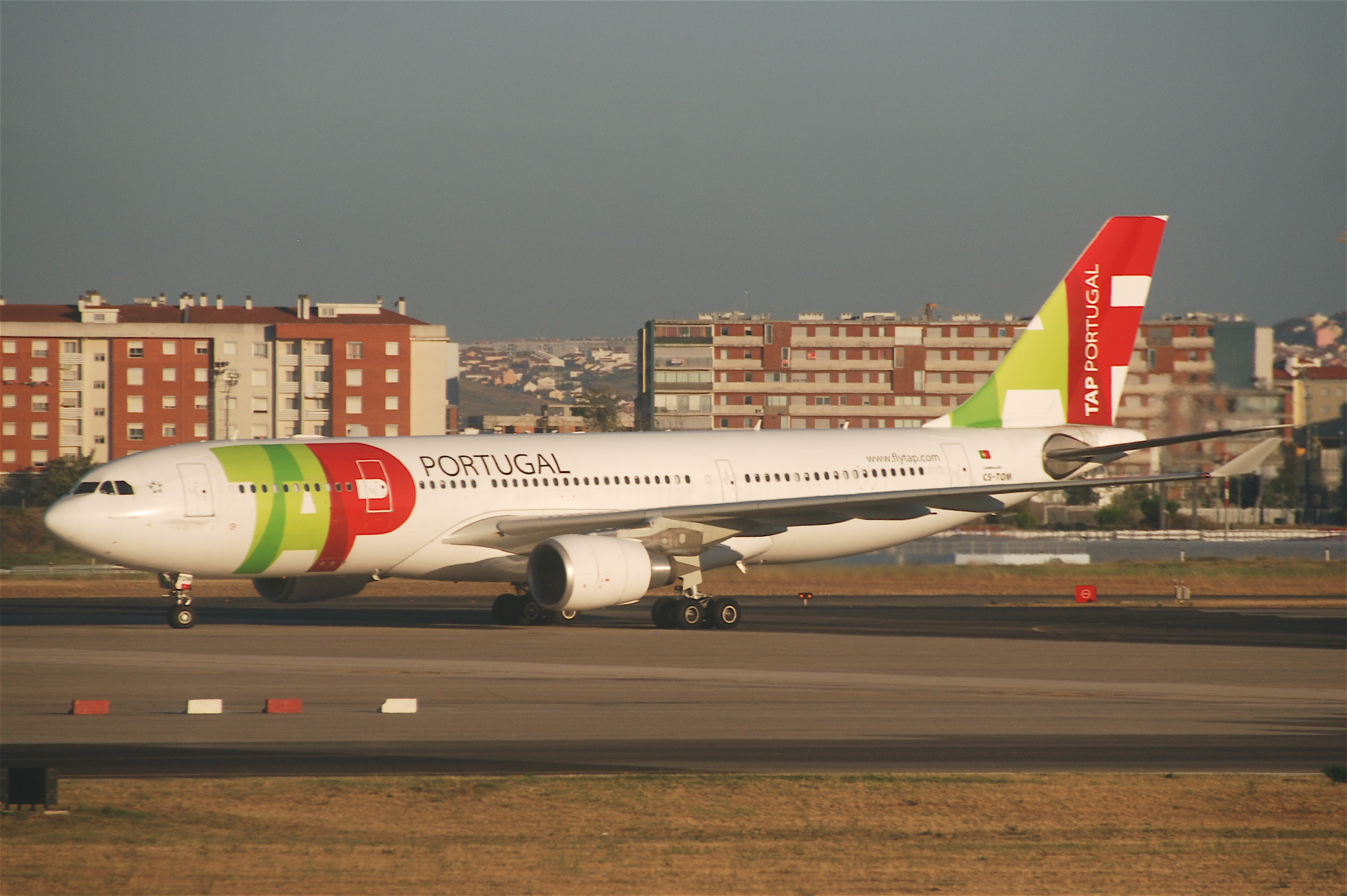 TAP Air Portugal Airbus A330-223; CS-TOM@LIS;13.07.2011/608ar